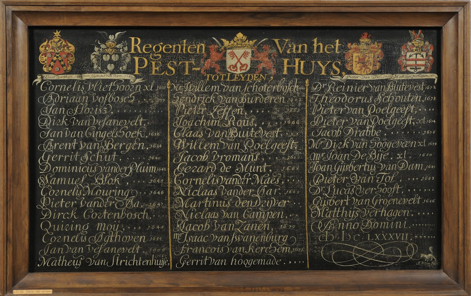 Naamlijst van regenten van het Pesthuis 1635-1687 geschilderd door Jan of Johannes de Vos, 1635-1687.